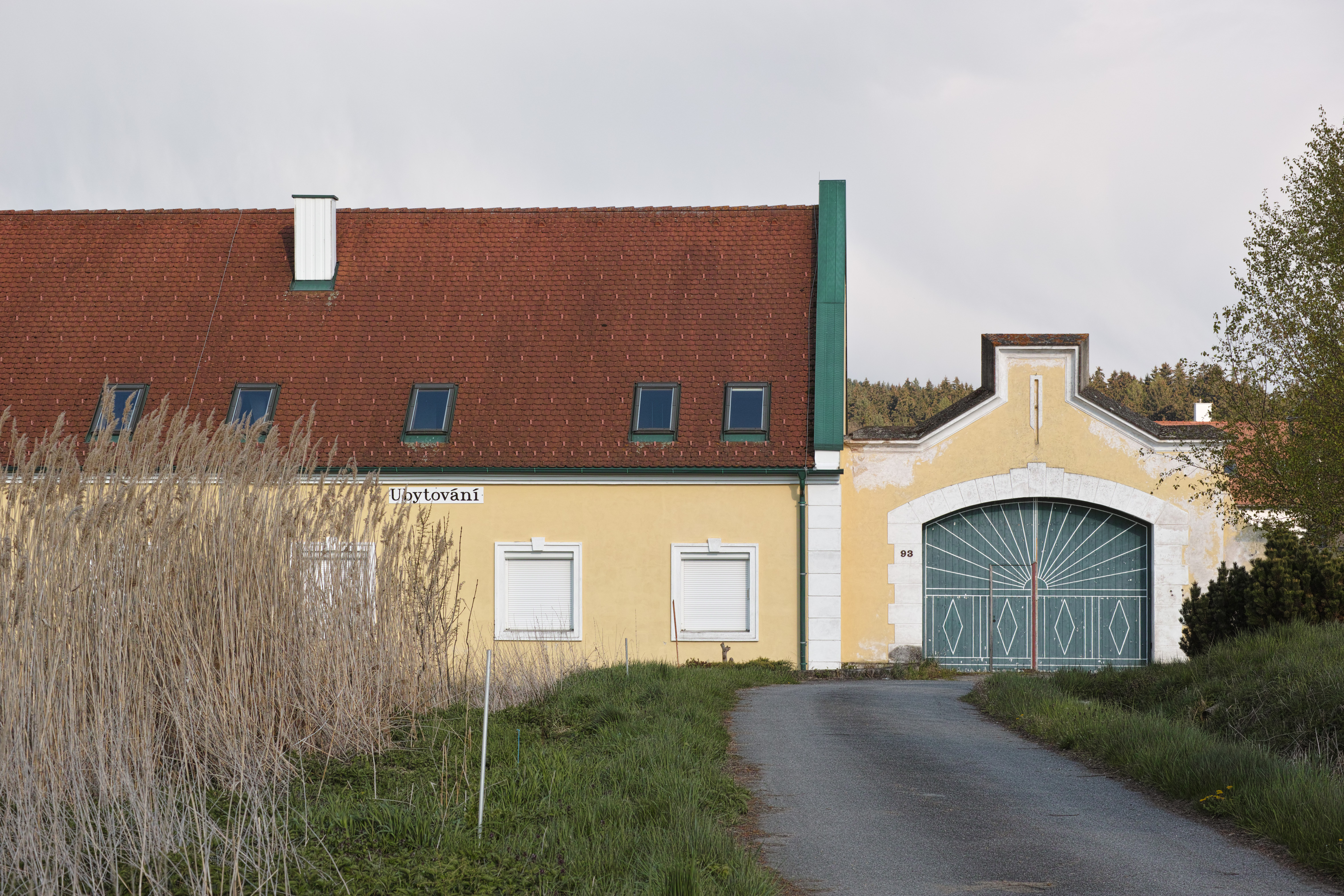 Chyňava (Hosín)